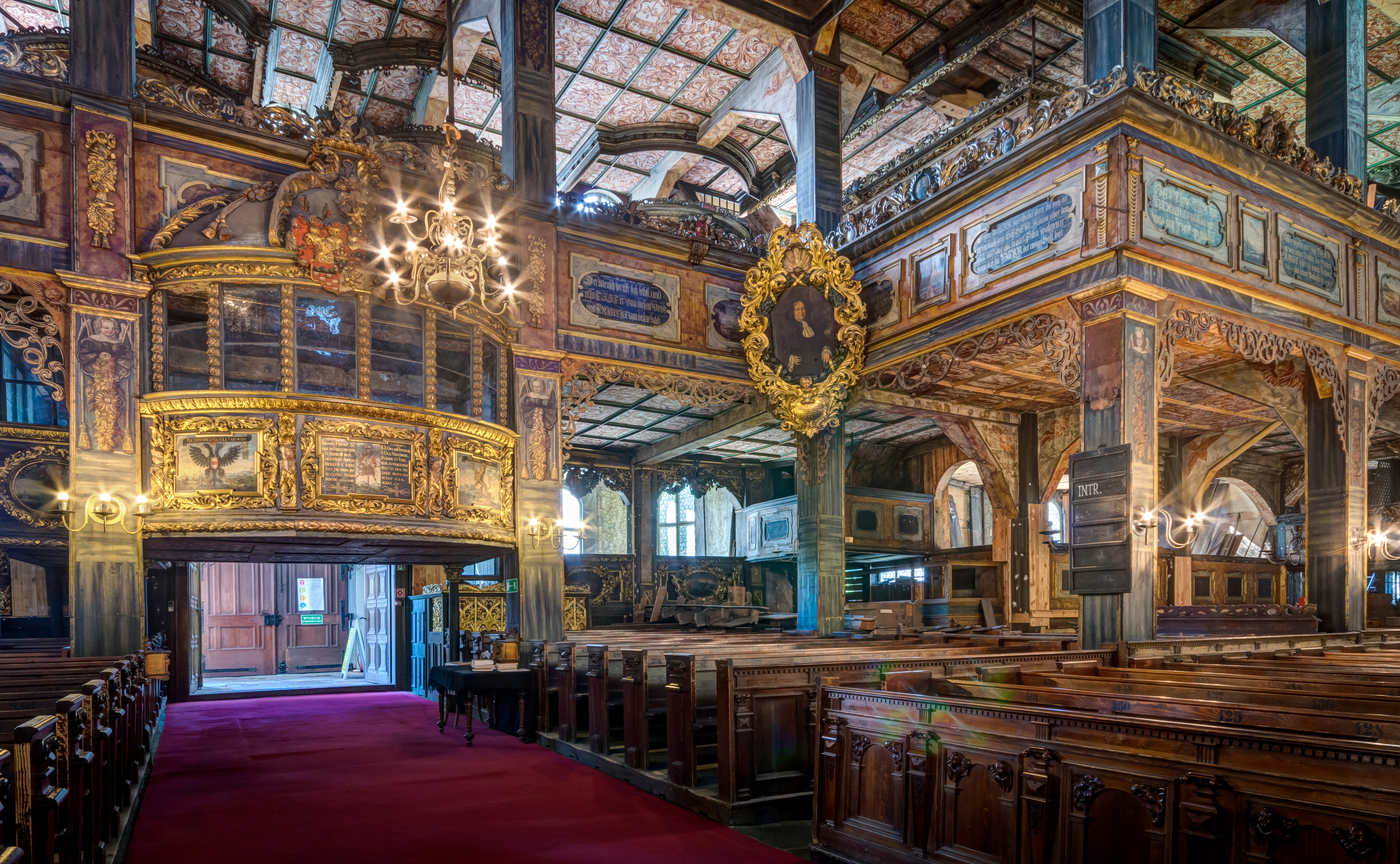 Świdnica, kościół ewangelicki (Pokoju), poł. XVII, XVIII - wnętrze kościoła w dziennym świetle